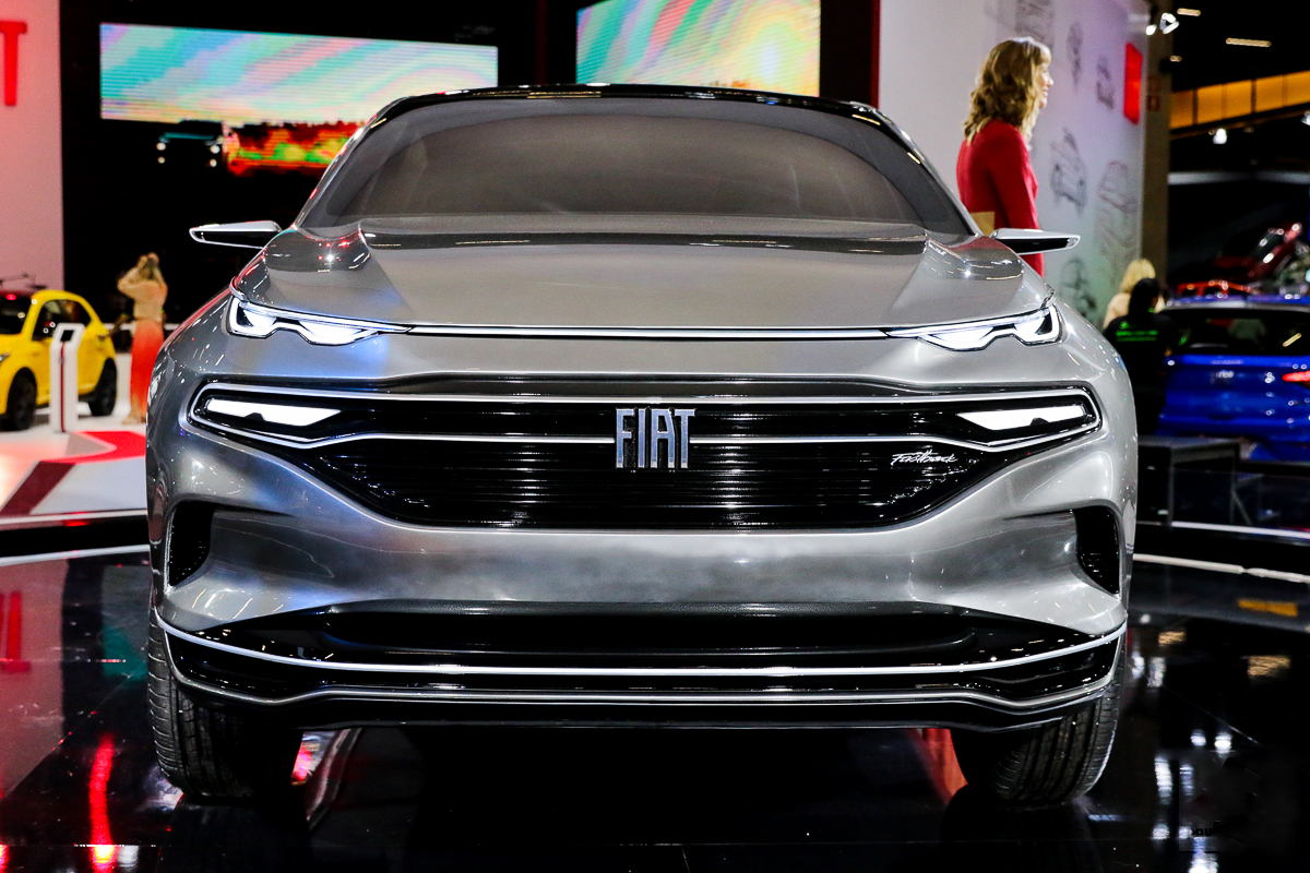 Salão do Automóvel 2018